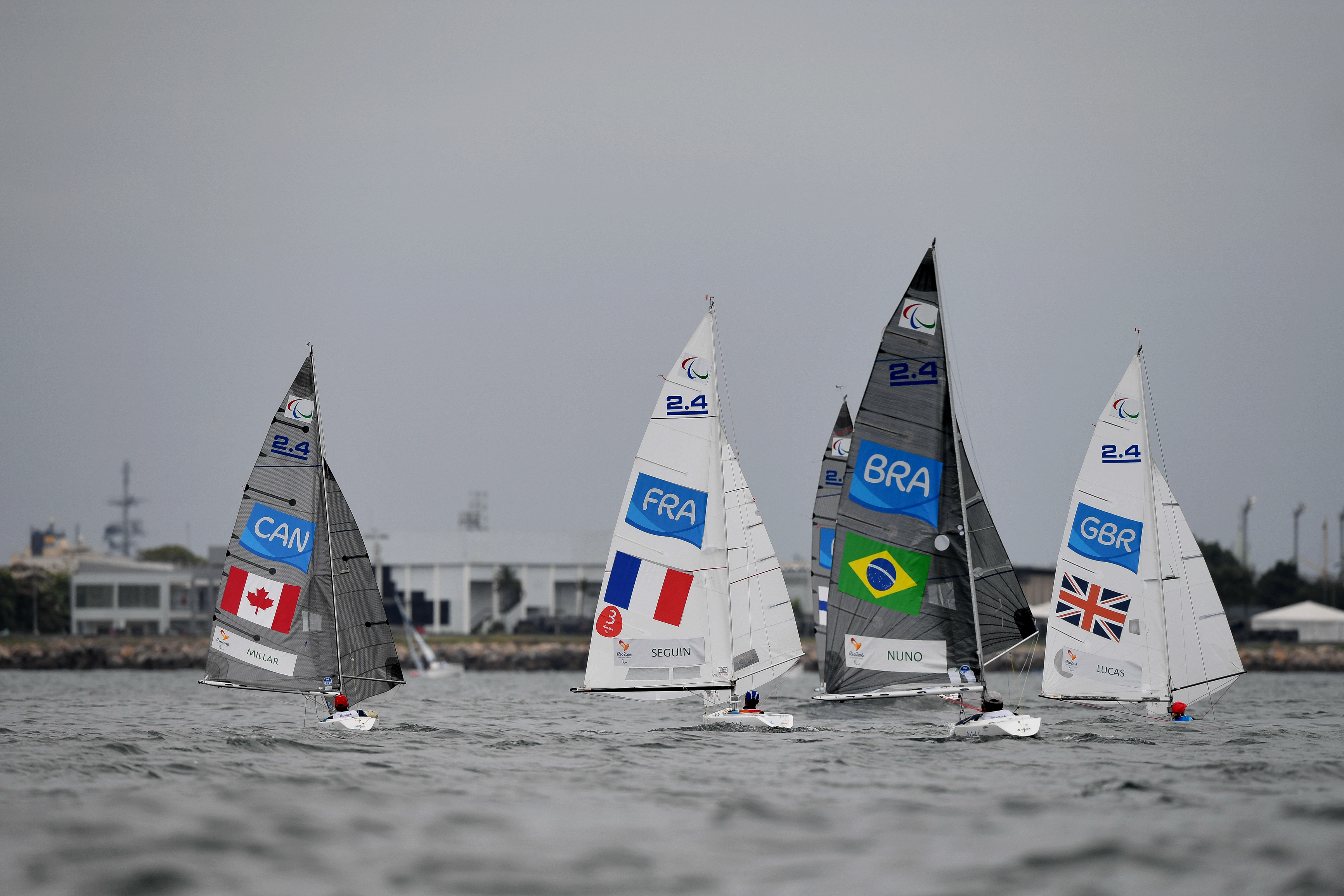 Rio de Janeiro - Competição de Vela, barco de quilha fixa para 3, 2 e 1 pessoa, das Paralimpíadas Rio 2016, na Marina da Glória (Tânia Rêgo/Agência Brasil)